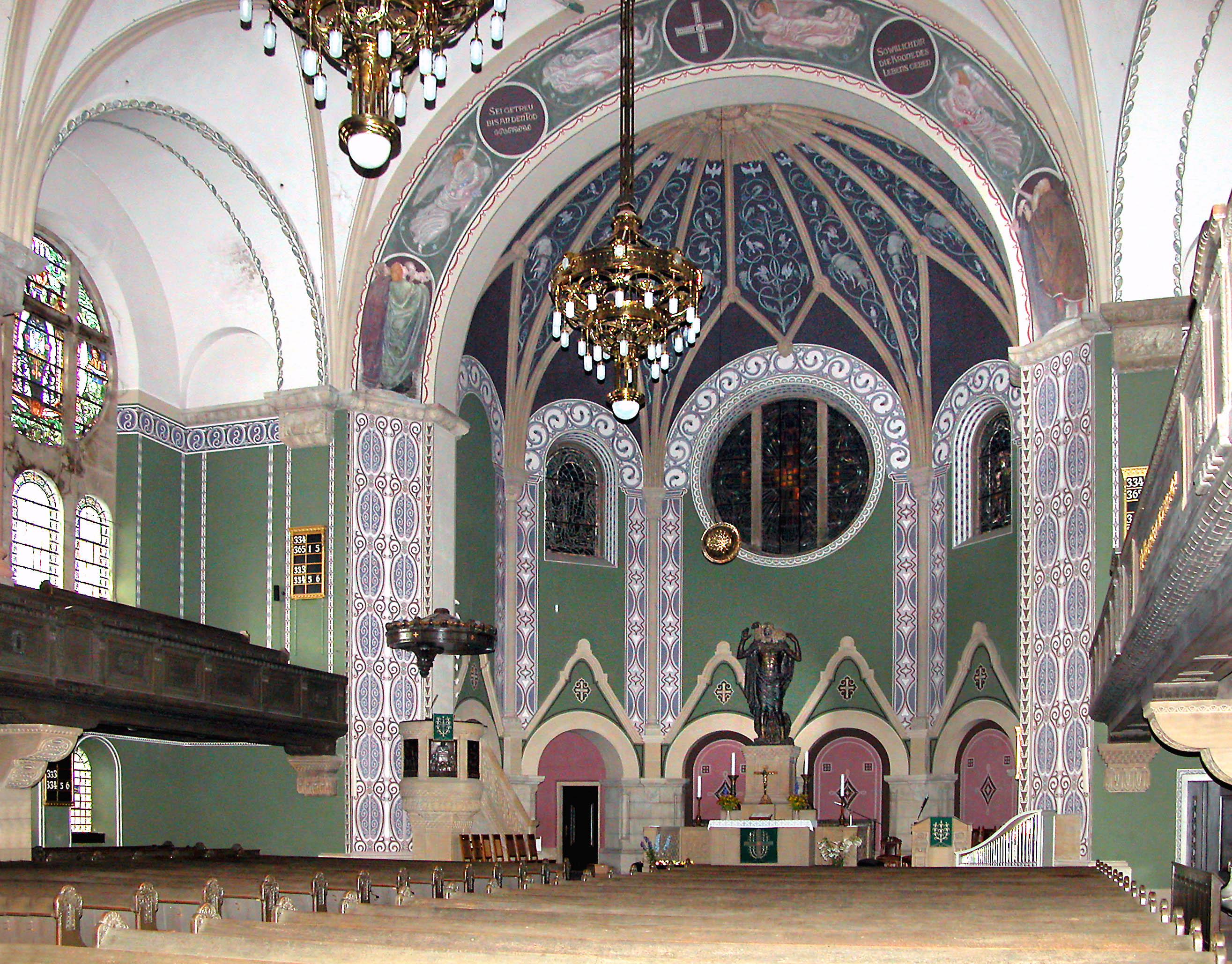 13.09.2004 01277 Dresden-Striesen, Wittenberger Straße 96 / Ecke Schandauer Straße (GMP: 51.042334,13.799021): Versöhnungskirche Dresden. 1902 von Gustav Rumpel und Arthur Krutzsch entworfen und 1905-1909 von Fritz Rumpel erbaut. Die Gesamtleitung der Ausstattung hatte Otto Gussmann. Die künstlerischen Ausmalungen des Kirchenraumes übernahm nach diesen Vorgaben sein Schüler Max Friedrich Helas. Der Bildhauer Georg Wrba schuf die große Skulptur des guten Hirten am Altar, das Altarkruzifix und seine beiden Leuchter. [DSCN5038.TIF]20040913180DR.JPG(c)Blobelt